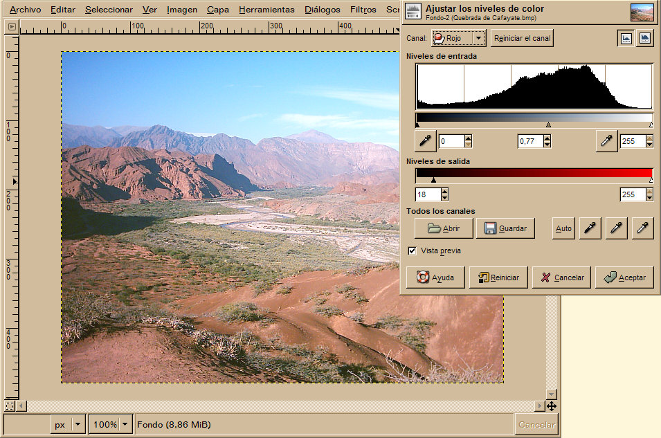 Ejemplo de nivelacion de color en Gimp.